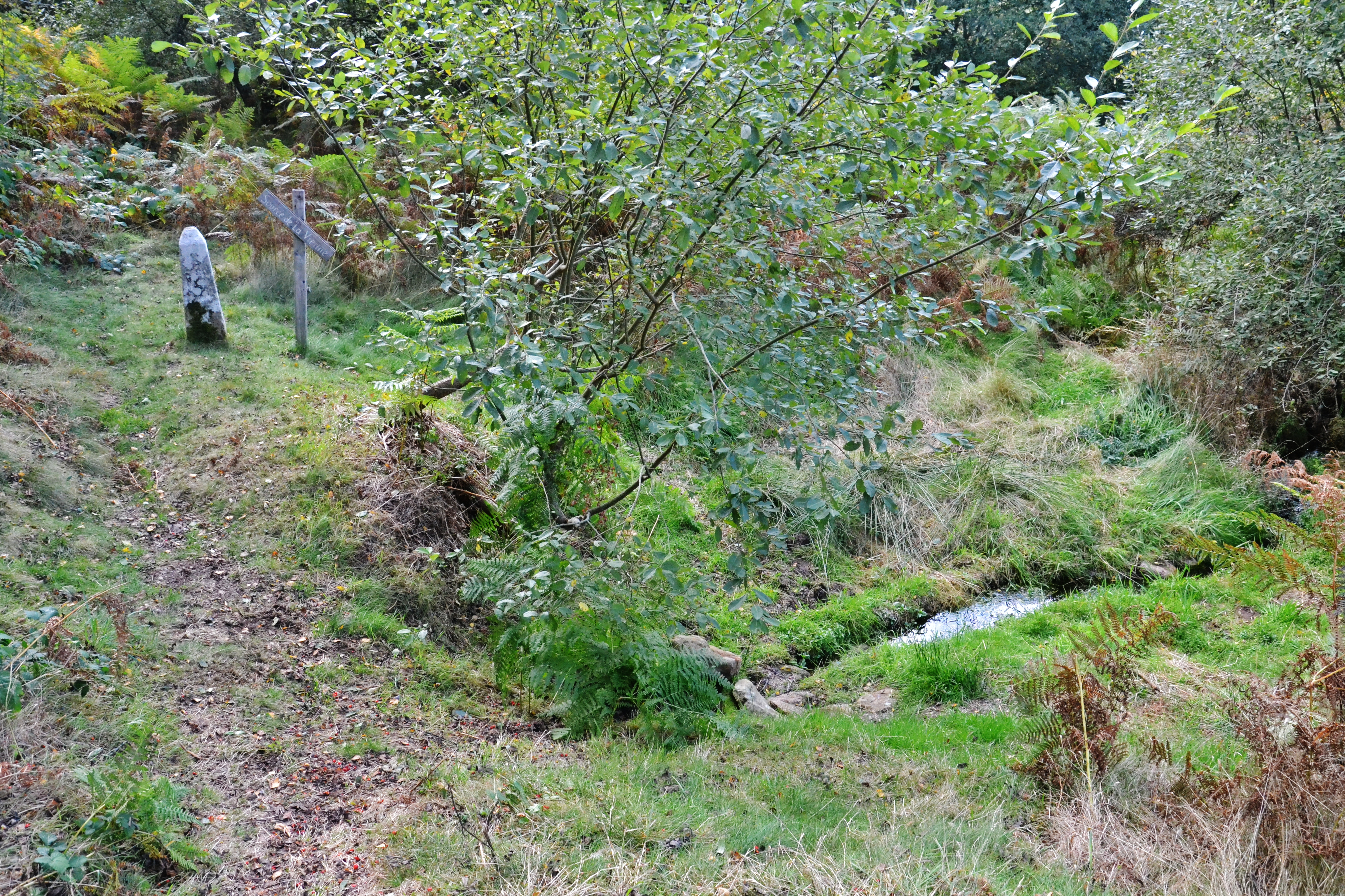 Une des sources de la Vienne (Saint-Setiers, Corrèze, France)